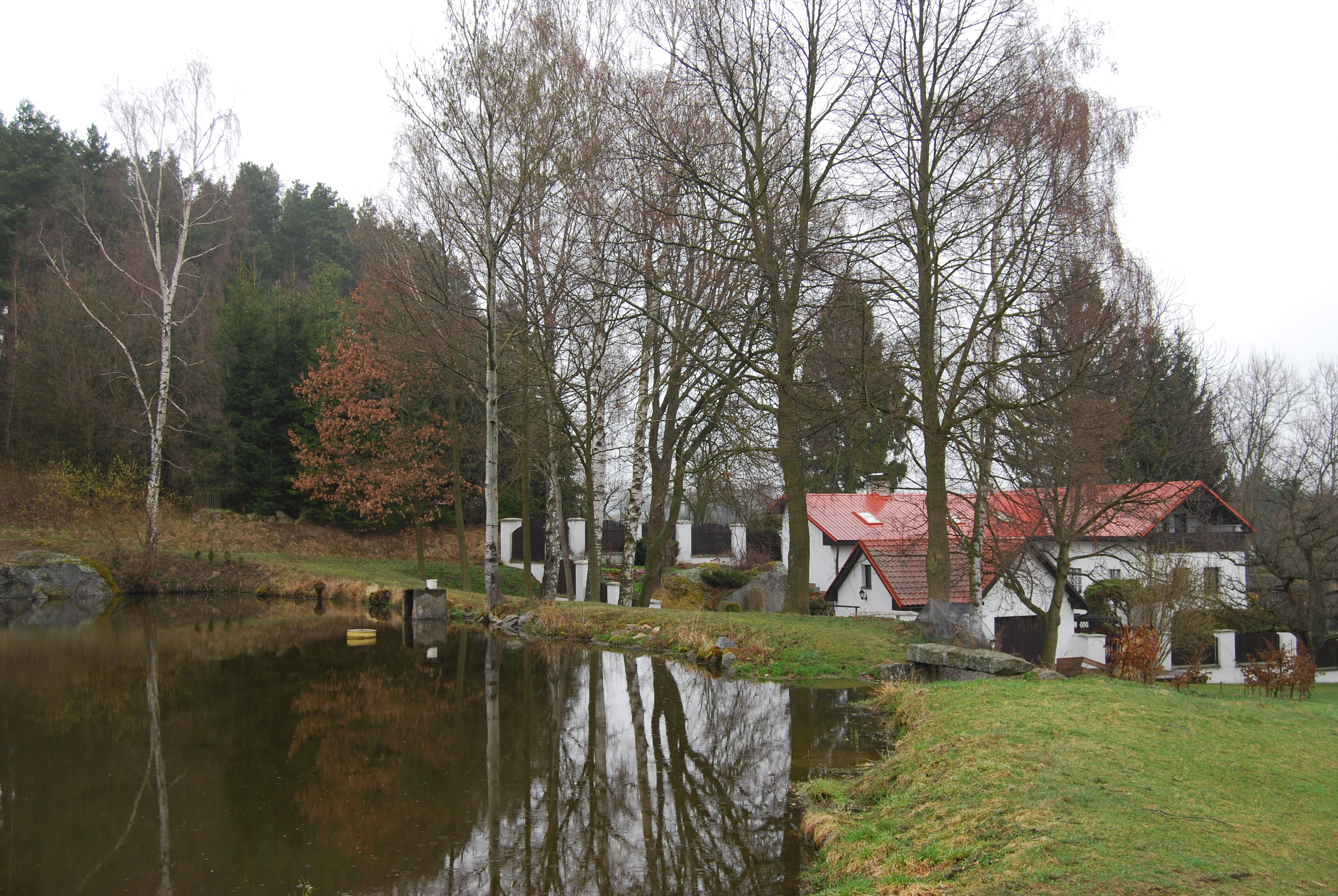 Pohled na část obce. Pechova Lhota je místní část obce Hrejkovice. Okres Písek. Česká republika.